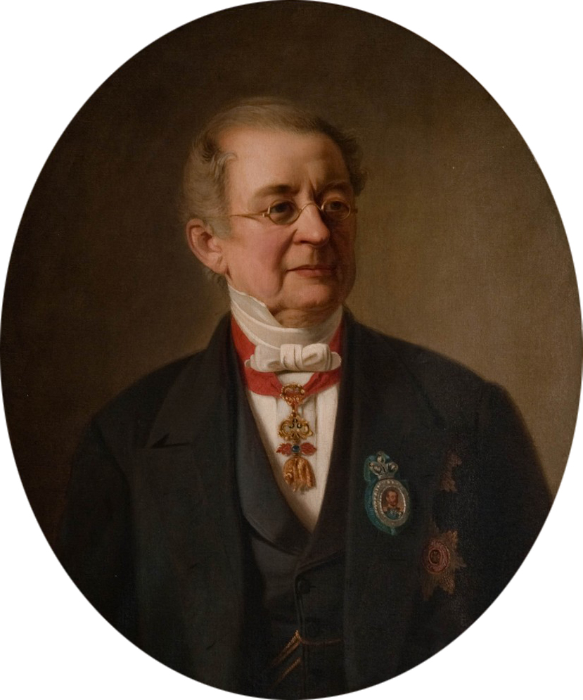 «Портрет Светлейшего князя А.М. Горчакова» Холст, масло, 1870-1880-е гг., овал 73х61 см Портрет - фрагментарное авторское повторение портрета А.М. Горчакова, написанного в 1867 г..